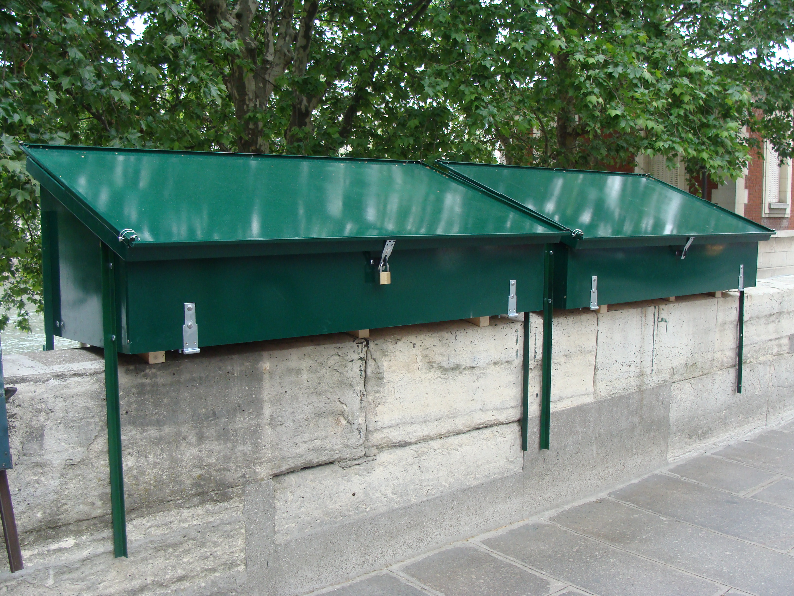 Bouquinistes closed boxes, Seine embankments, Paris